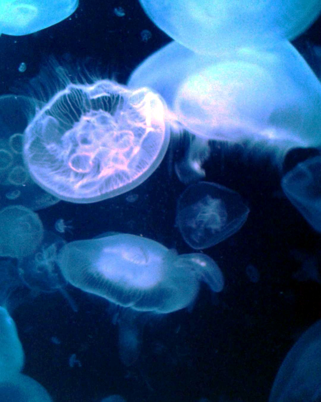 Méduse lune, aquarium de Paris